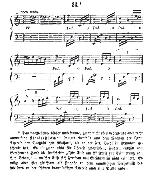 Erste Seite aus der Erstausgabe von Beethovens Für Elise in Ludwig Nohl: Neue Briefe Beethovens. Stuttgart 1867, S. 28